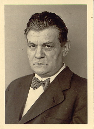 Bernhard Uffrecht im Jahr 1933.